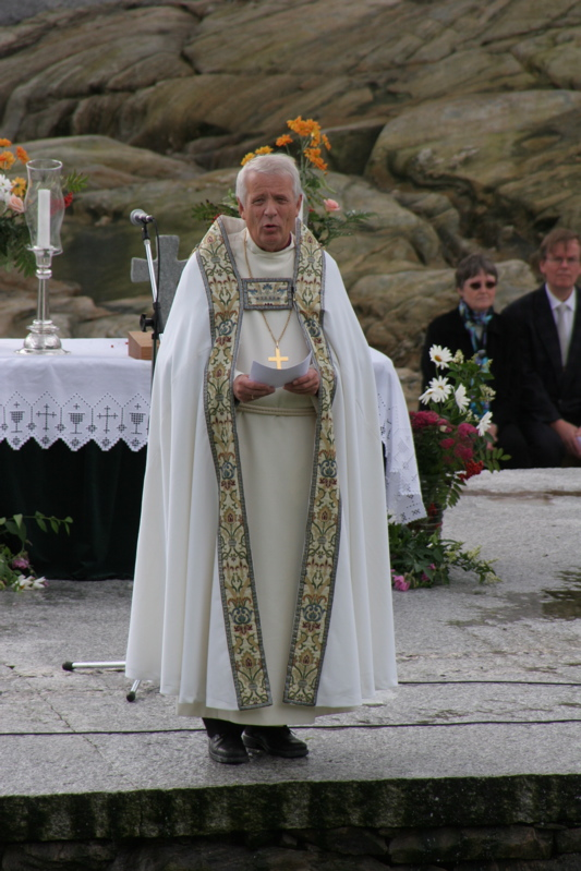 Biskop i Bjørgvin Ole D. Hagesæther.